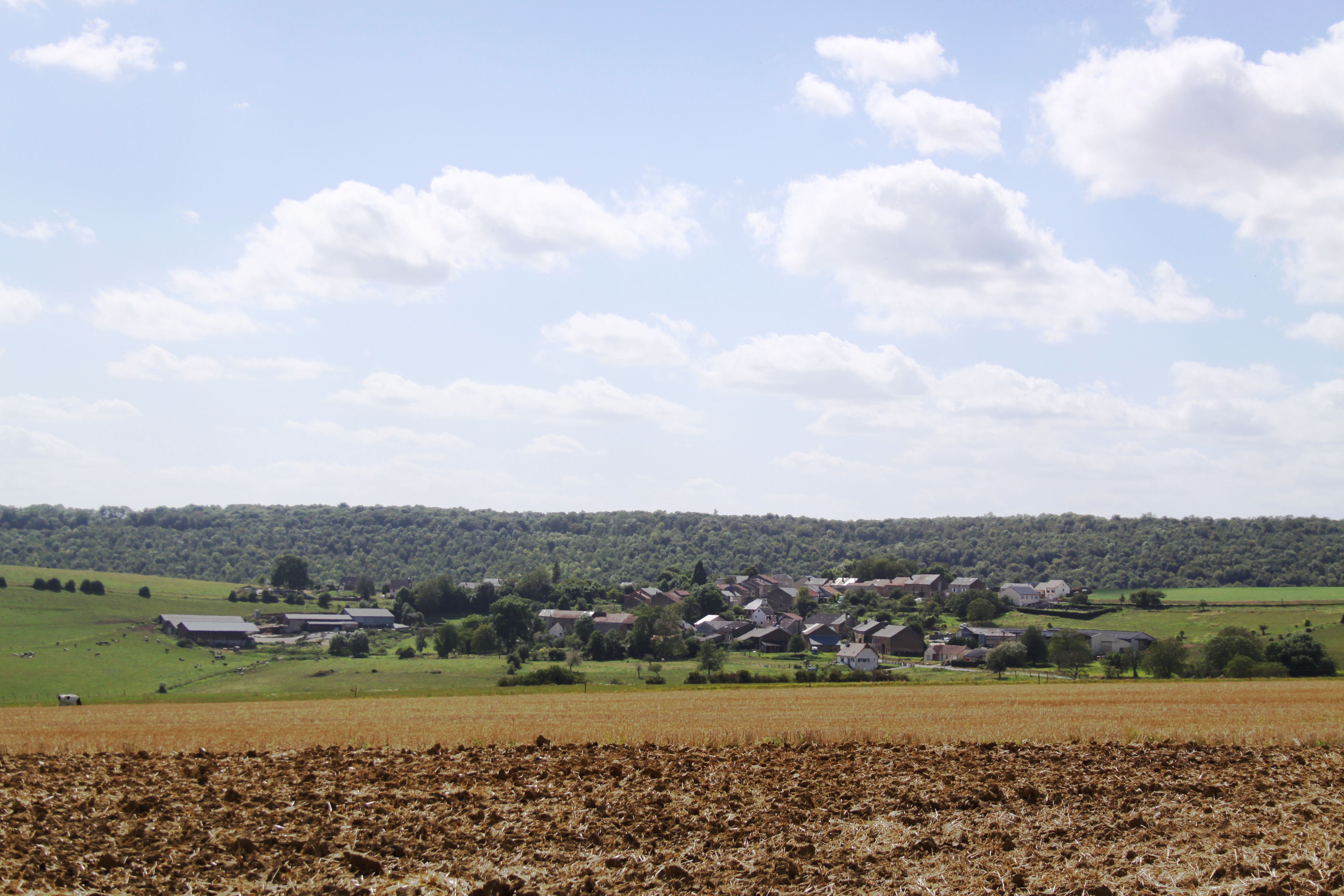 Village Ardennais